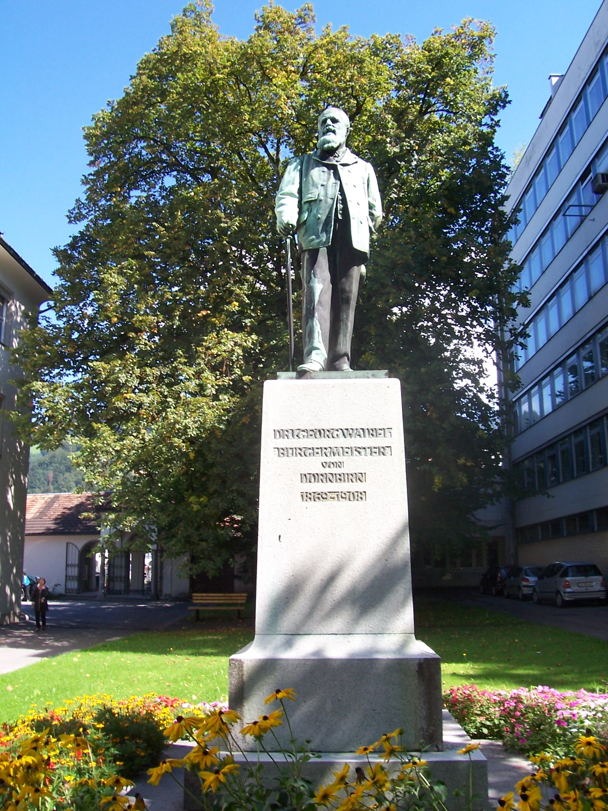 sculpture of Johann Georg Waibel, mayor of Dornbirn 1869 - 1908. / Skulptur von Johann Georg Waibel, Bürgermeister der Stadt Dornbirn von 1869 - 1908.